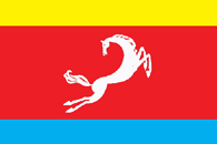 Bandera del raión de Kanevskaya